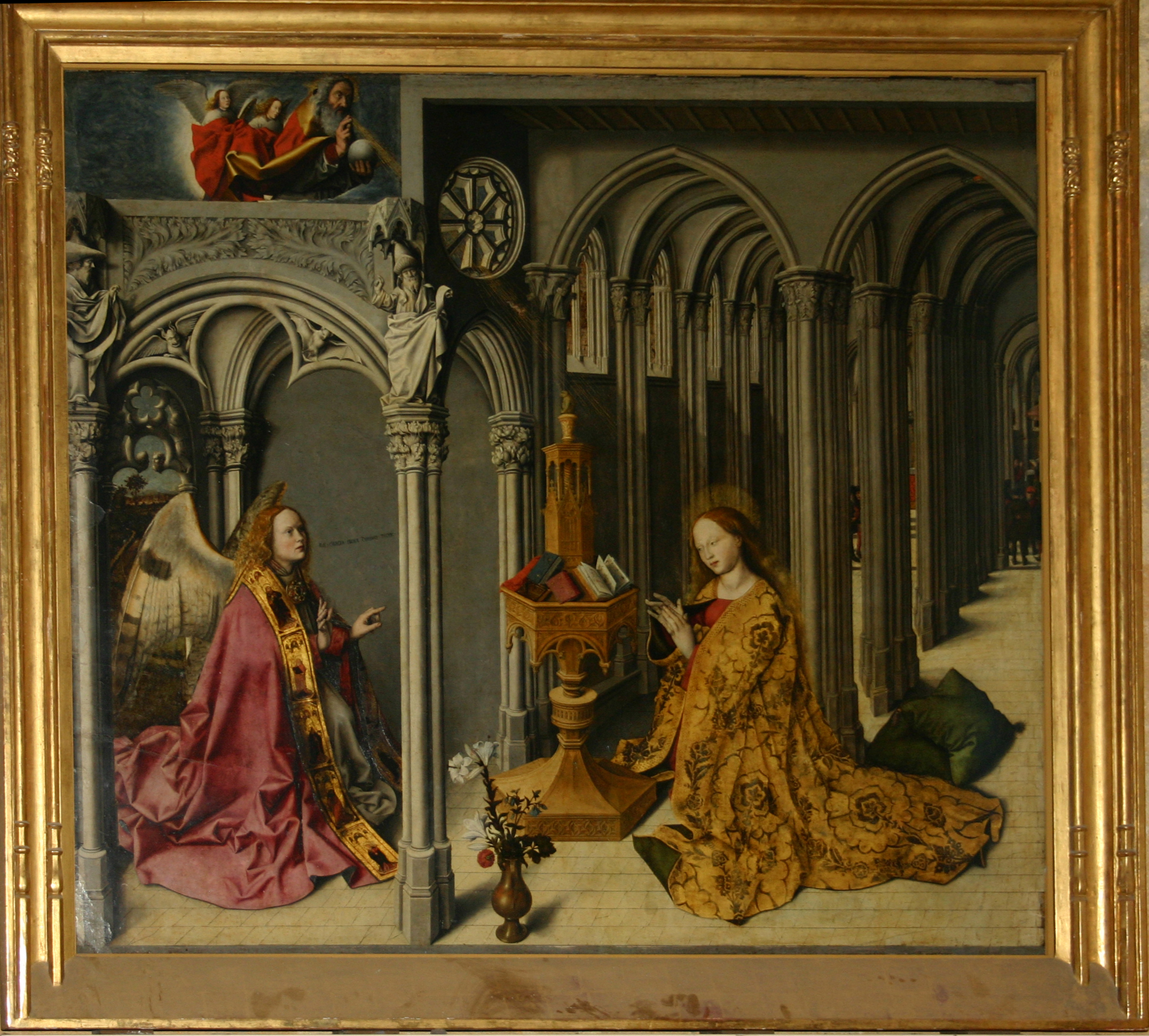 Annunciatie van Bartélemy van Eyck 1443-1444